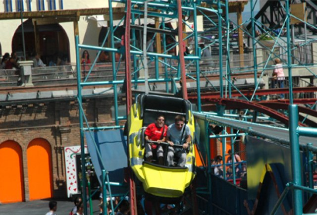 Antiga muntanya russa (ara ja desapareguda) del Parc d'Atraccions del Tibidabo.